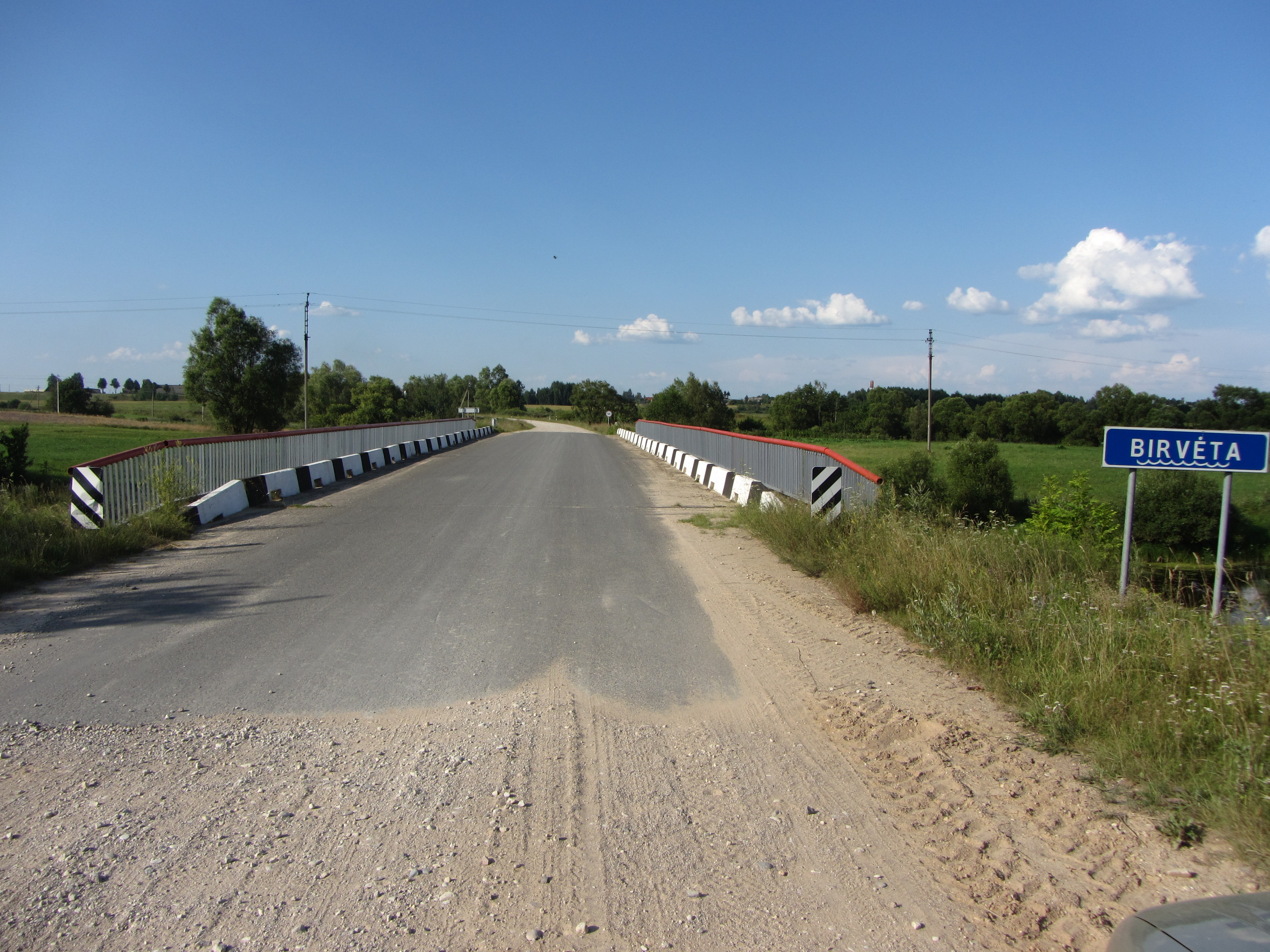 Pivorai 30150, Lithuania